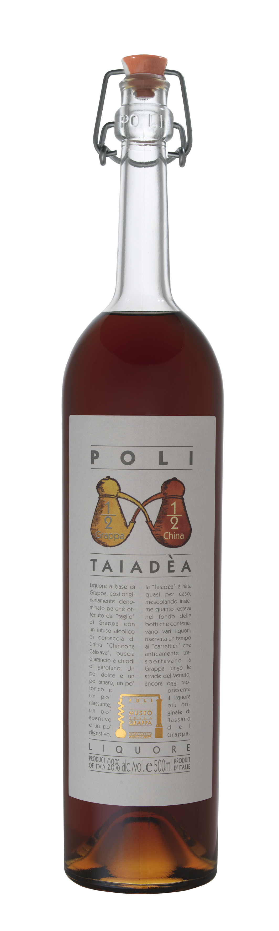 Liquore a base di grappa, erbe e spezie, ed acquavite di ciliegia, prodotto dalla Distilleria Bortolo Nardini di Bassano del Grappa.